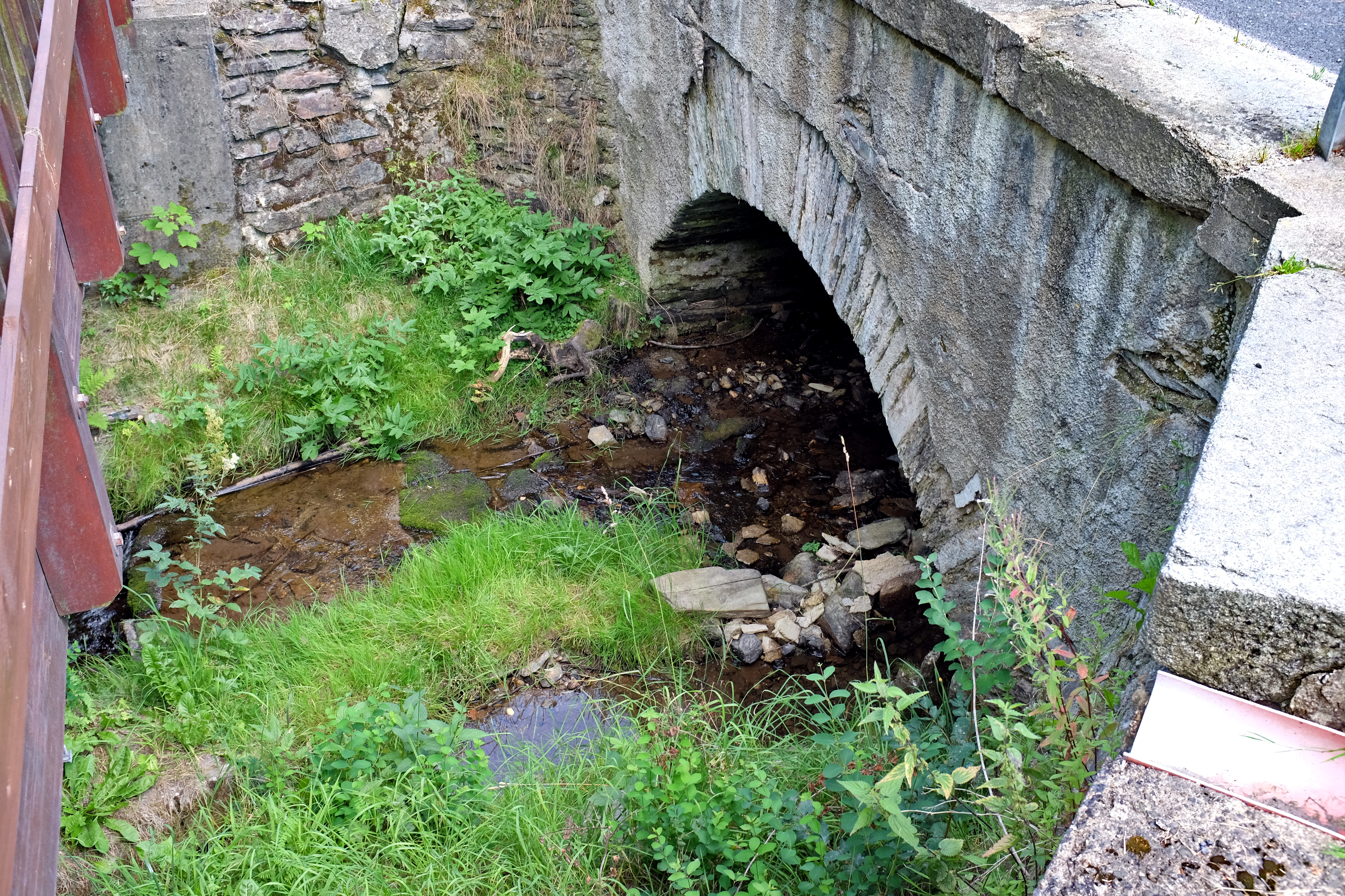 Hraniční potok, přítok Svatavy v zaniklé obci Hraničná, dnes místní část Kraslic, okres Sokolov